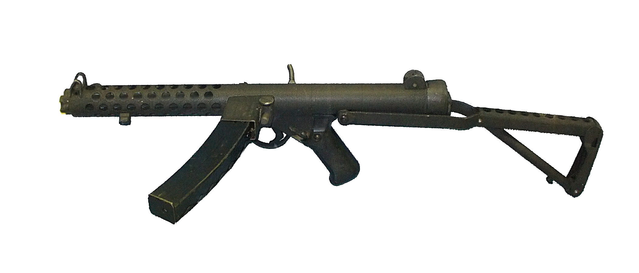 Sterling Mk4 submachine gun, Canada